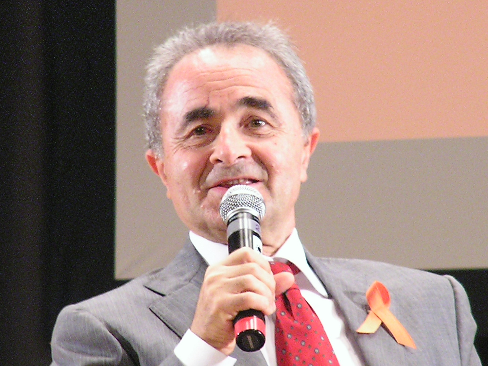 Il ministro della Difesa, Arturo Parisi, intervistato da Gad Lerner nel corso del "Cantiere democratico" di San Giovanni Valdarno. Foto di Louise Bonzoni ( "Cantiere democratico" di San Giovanni Valdarno